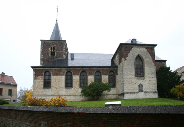 Linkebeek Kerkstraat 1B kerk